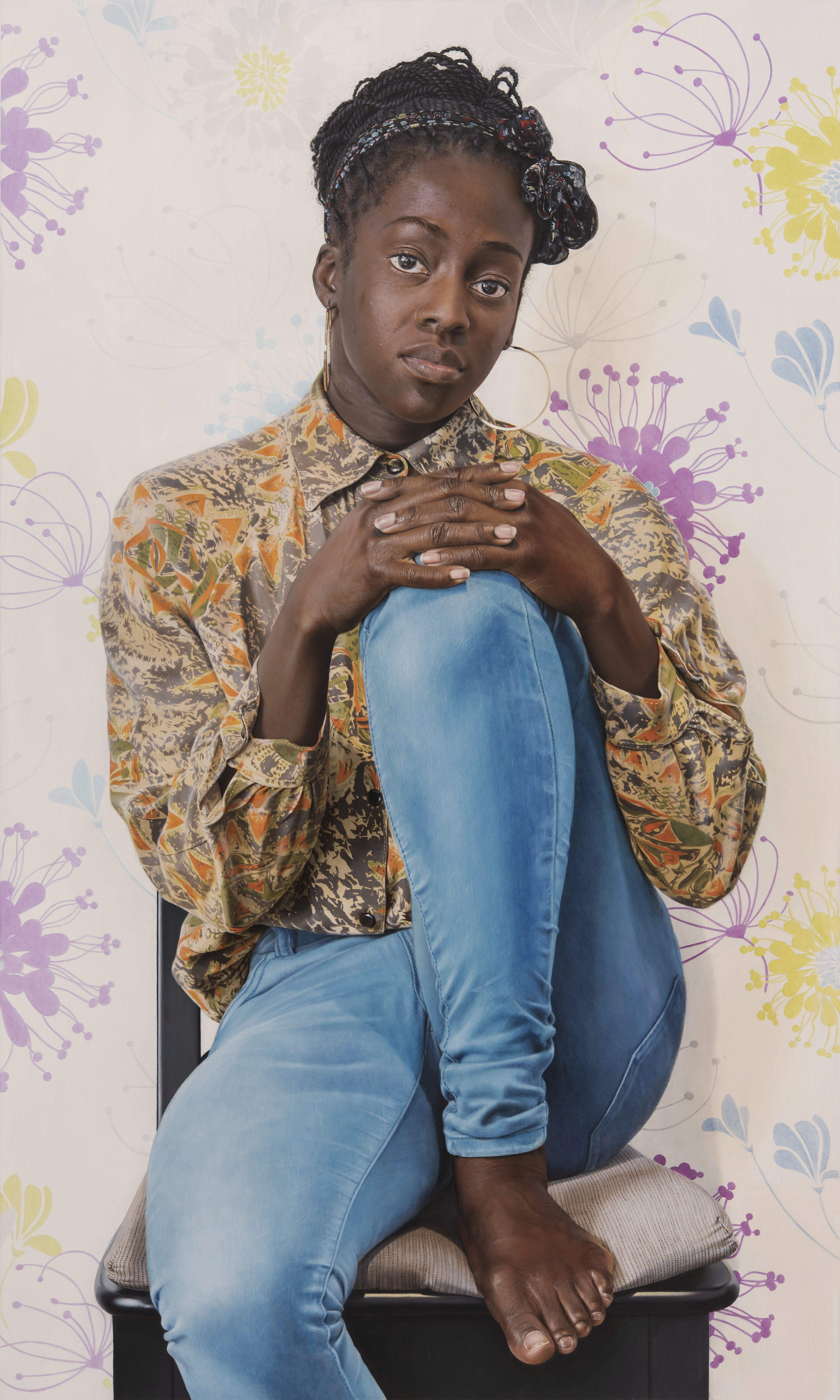 Ölbild von Massimiliano Pironti auf Aluminium 1000mm x 600mm, ab 14. Juni 2018 in der National Portrait Gallery, London.